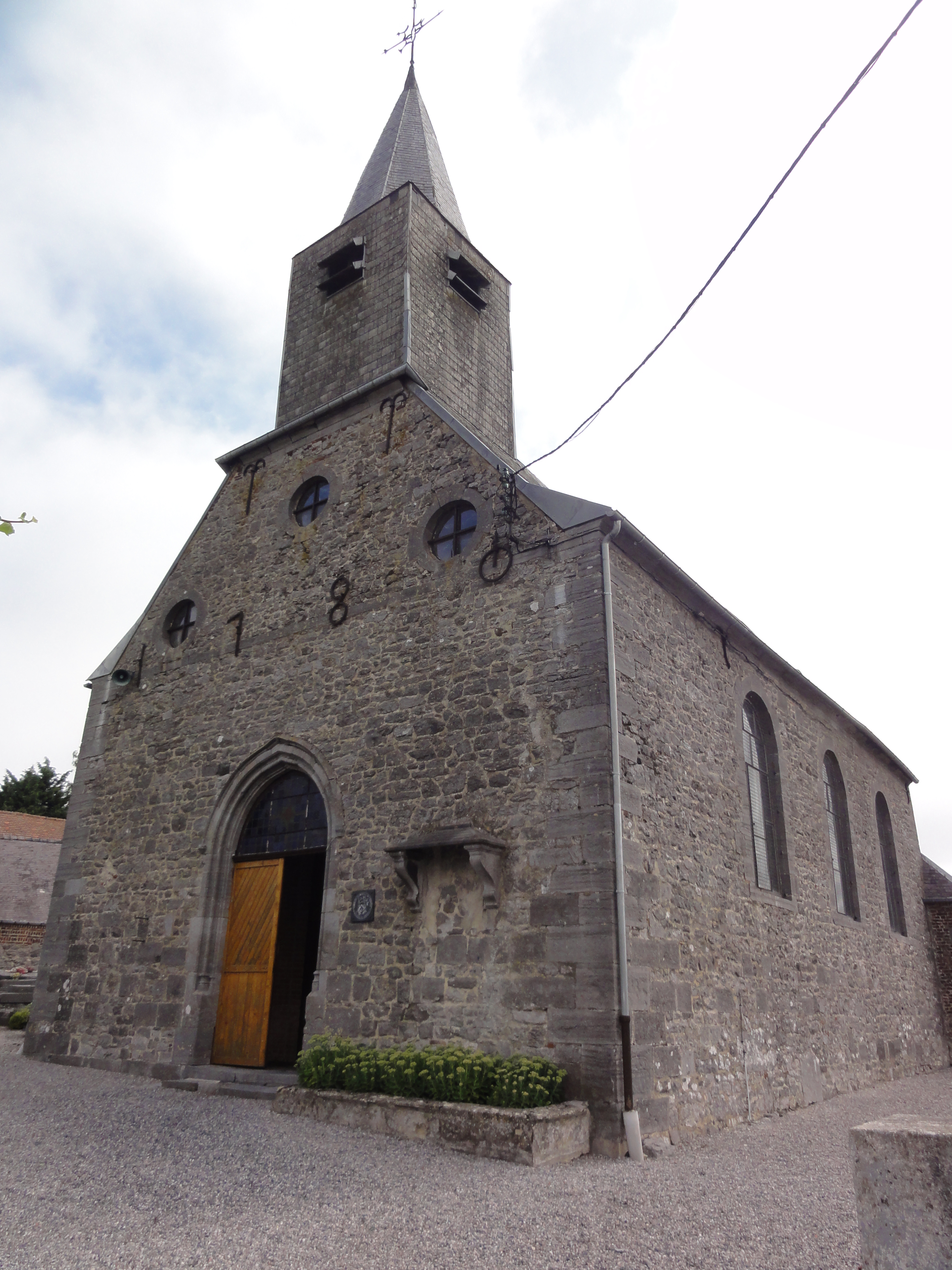 Cerfontaine (Nord, Fr) église, extérieur